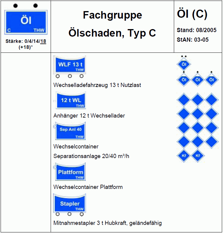 StAN des Technisches Hilfswerk über Fahrzeuge der Fachgruppe Ölschaden Typ C